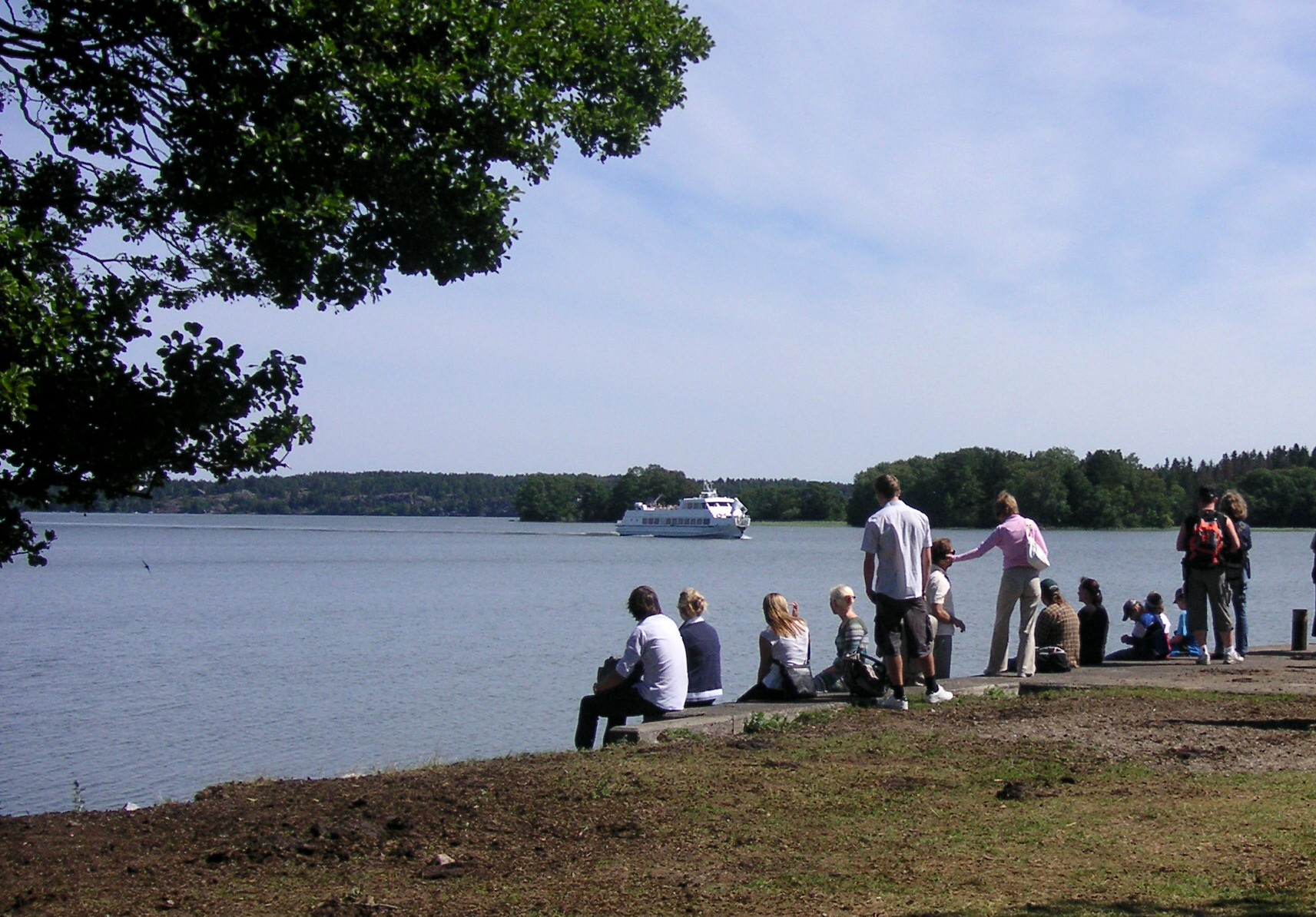 Hovgårdsfjärden från båtbryggan på Hovgården på Adelsön